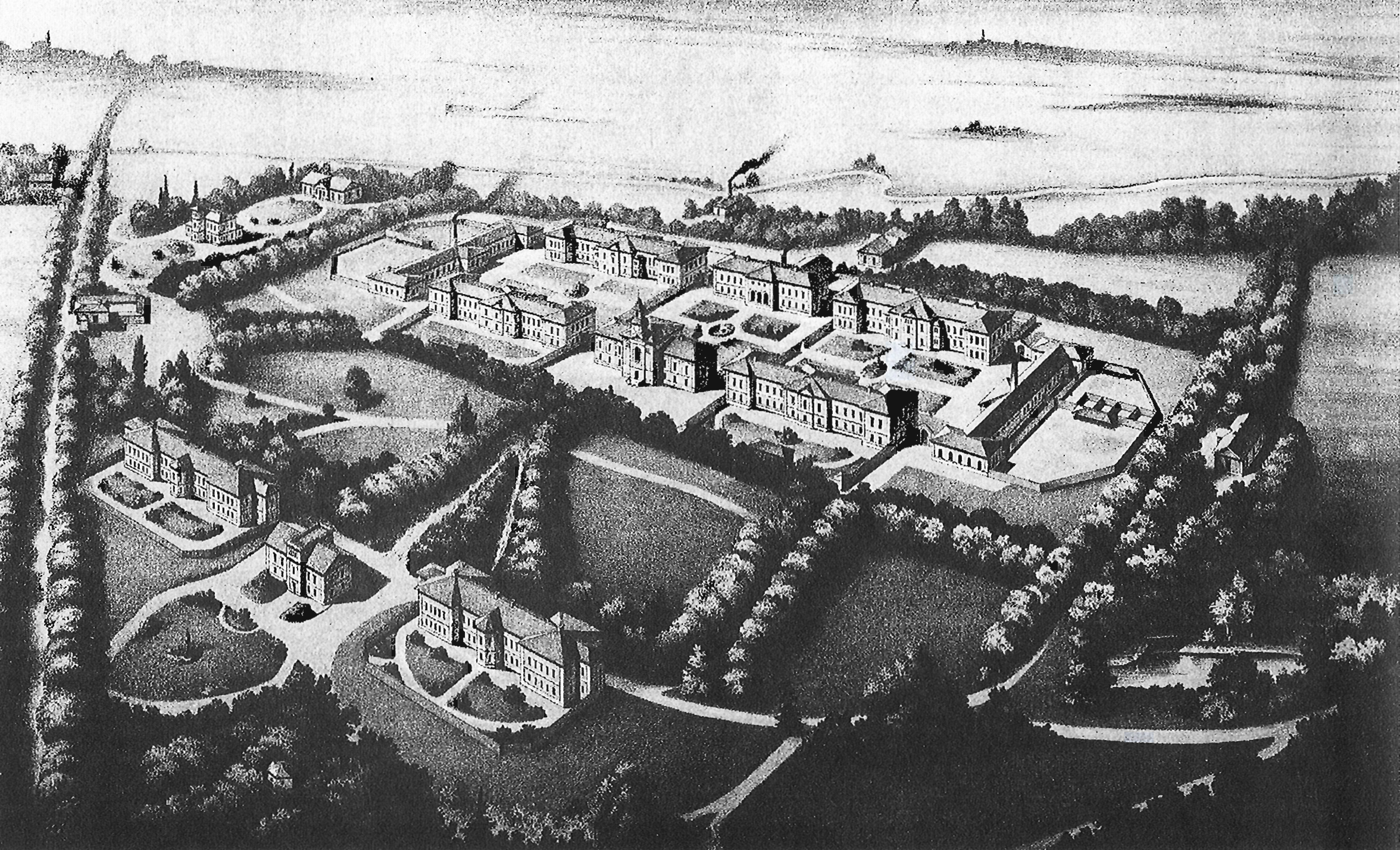 Ur: Bidrag till Sveriges officiella statistik 1884. Gen.Stab.Lit.Anst.